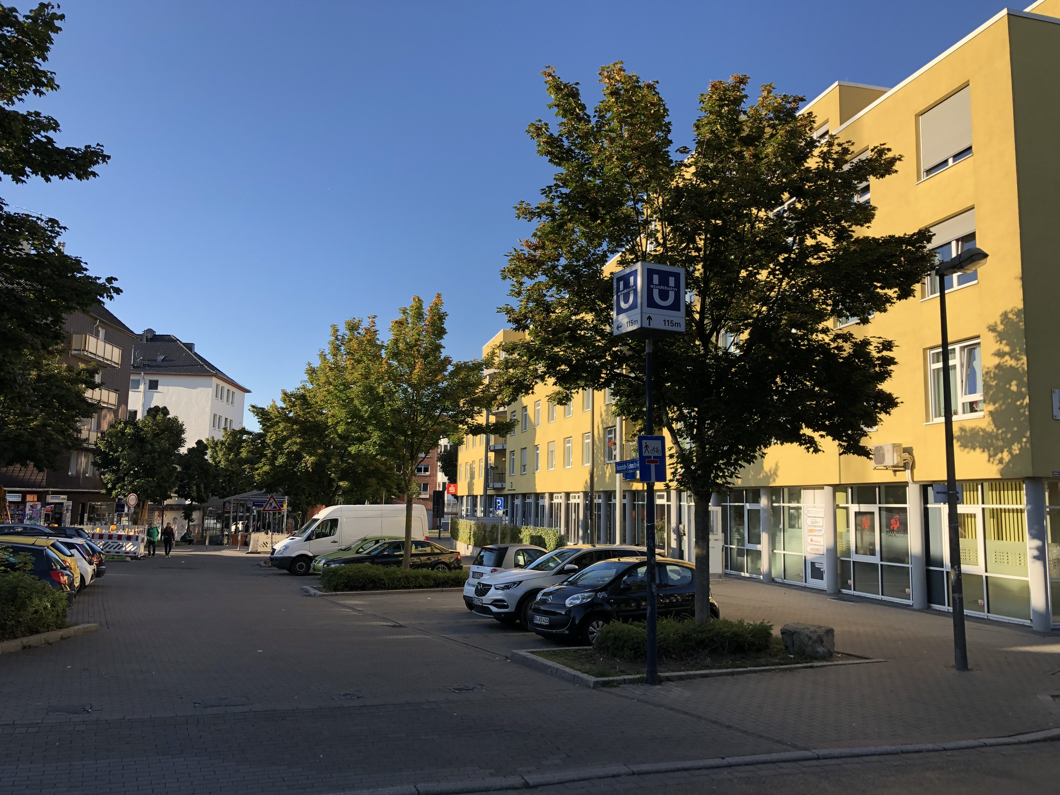 Ein Blick auf den Heinrich-Schmitz-Platz vom Westpark ausThis is a photograph of an architectural monument., no. 0